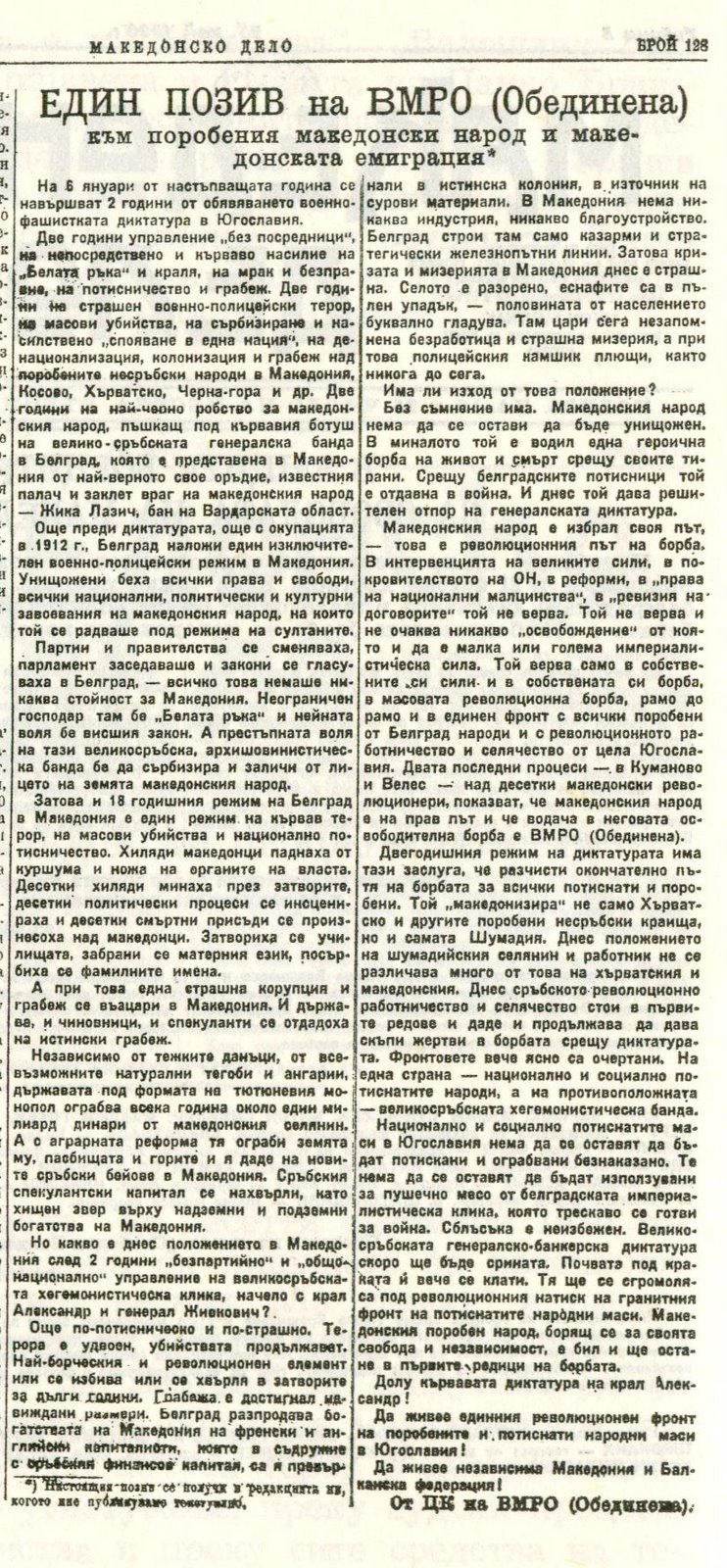 Вестникът на ВМРО (Обединена) "Македонско дело".